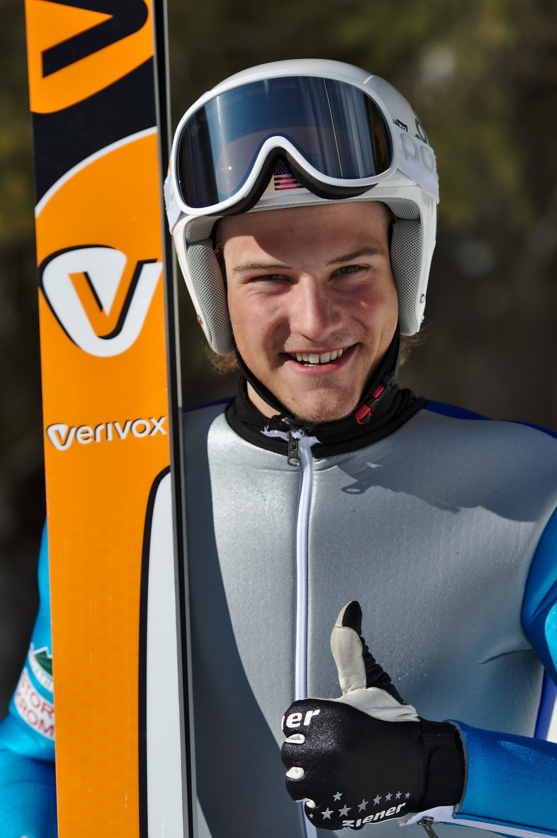 Ben Loomis in Eisenerz 2017